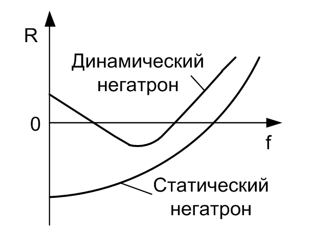 Рис. 3 – Частотные зависимости дифференциального сопротивления статического и динамического R-негатронов